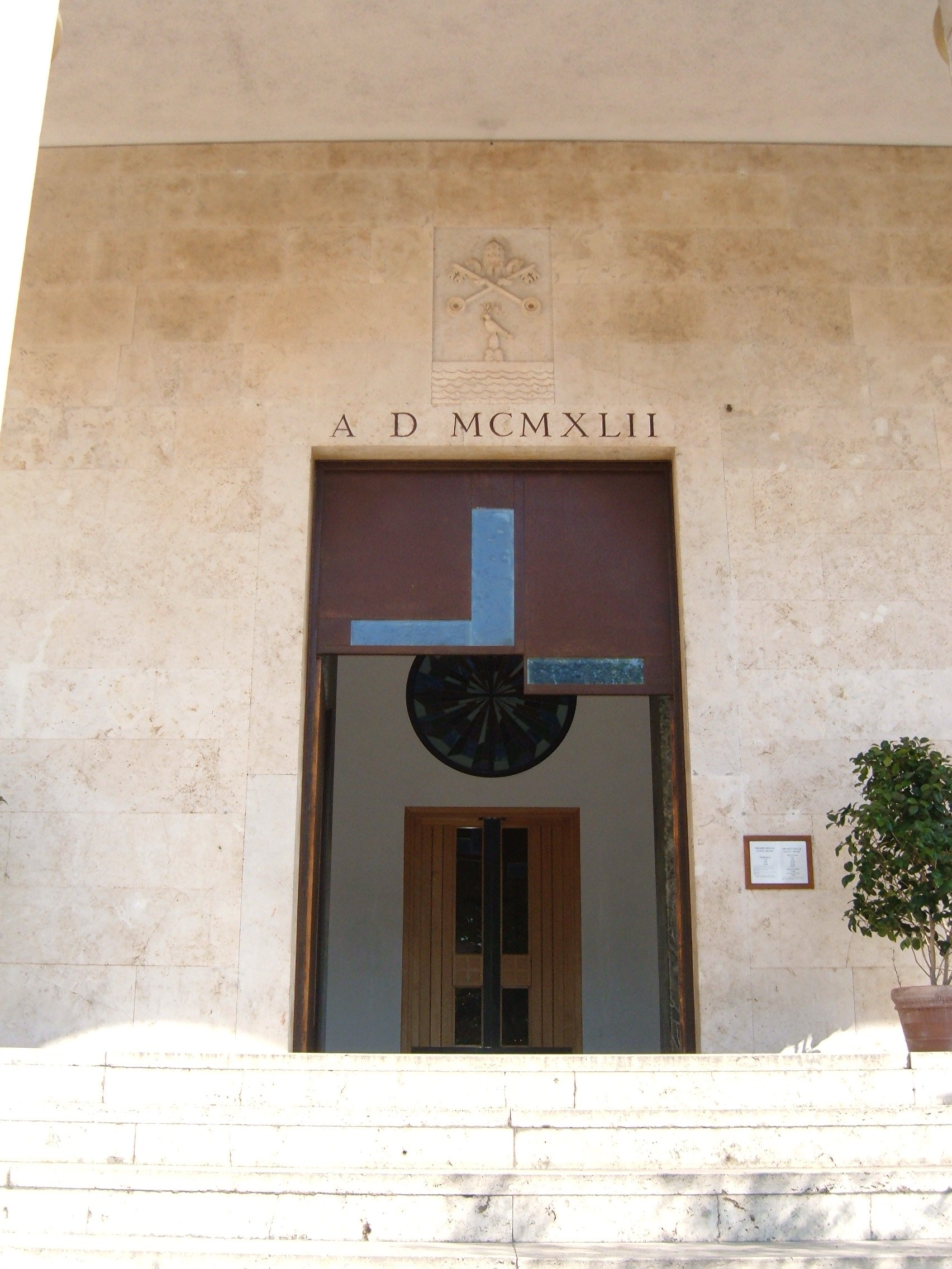 Chiesa di San Francesco d'Assisi e Santa Caterina da Siena, Patroni d'Italia, a Roma, nel quartiere Gianicolense.